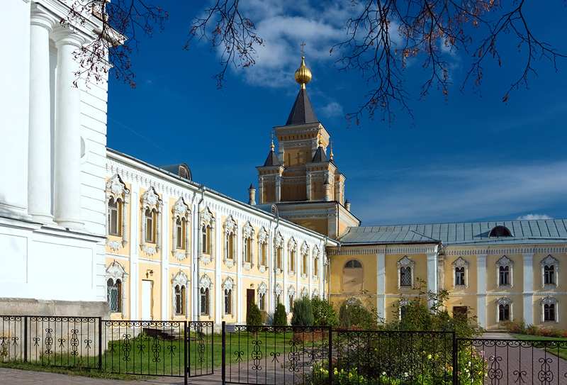 Башня северо-восточная (церковь иконы Божьей Матери «Всех скорбящих радость») (Москва и Московская область, Дзержинский, площадь Святителя Николая, 1)